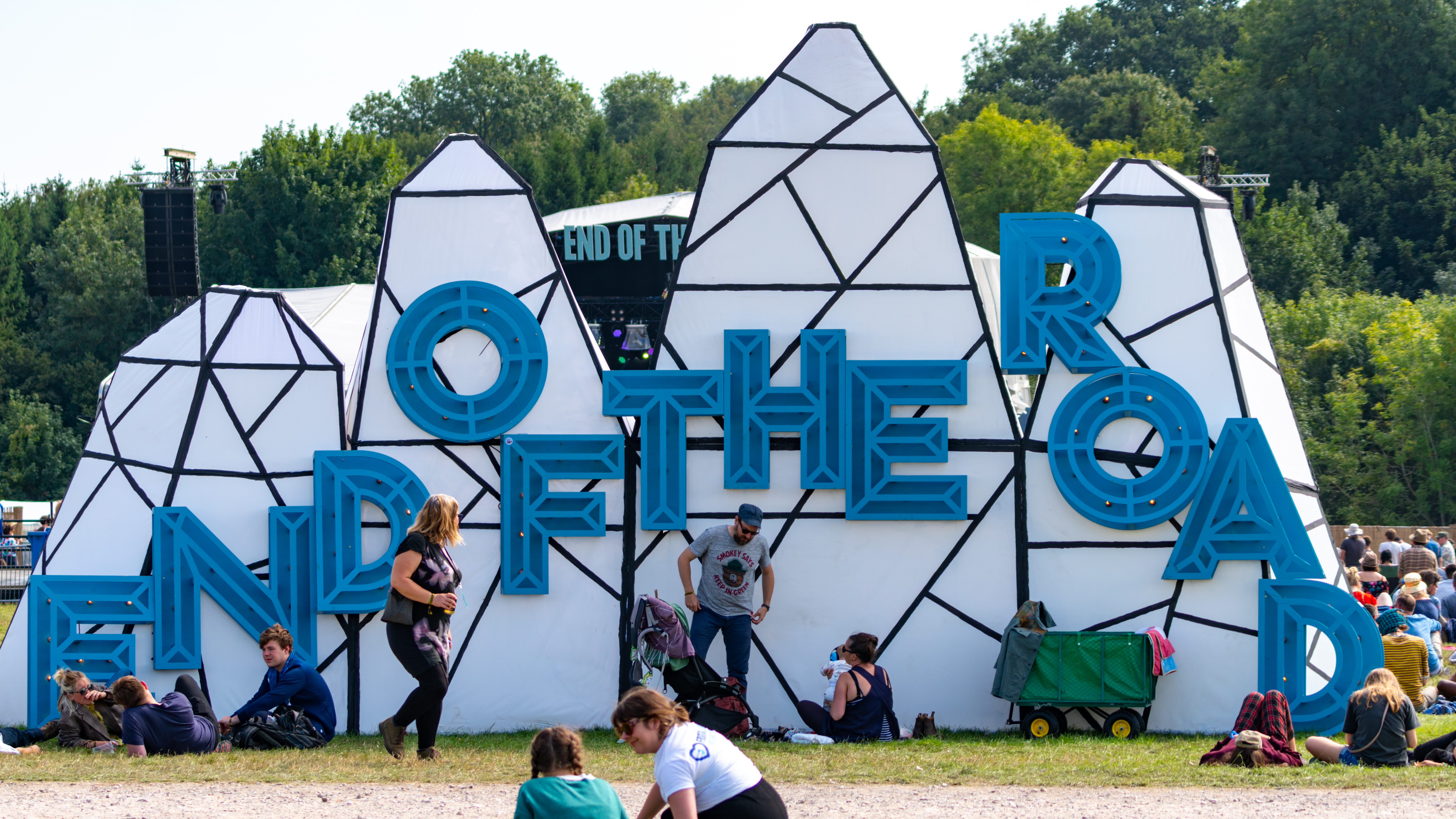 EOTR010918-9